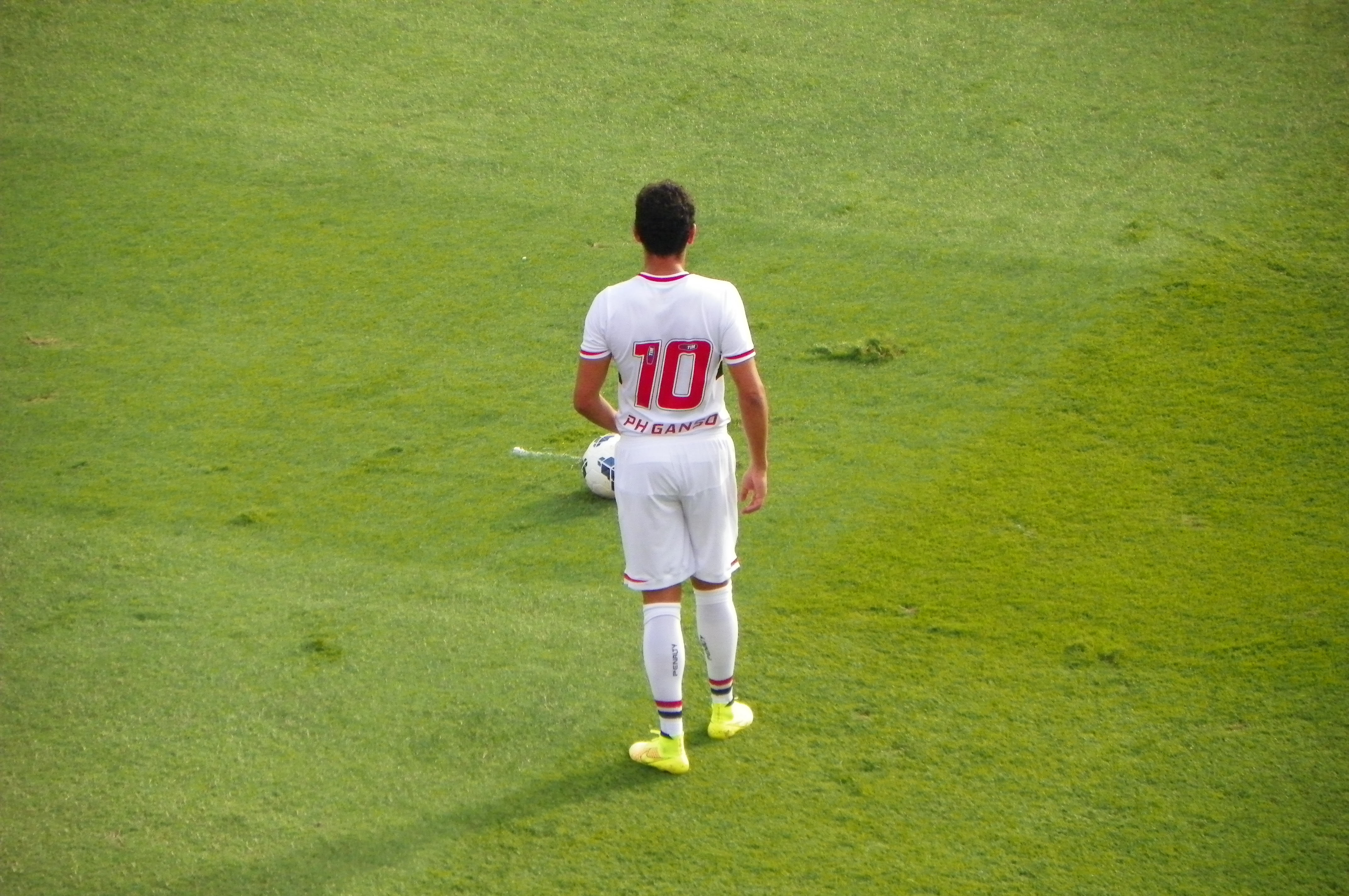 Português do Brasil: Paulo Henrique Ganso prepara-se para cobrar uma falta no Morumbi, em jogo contra o Sport.